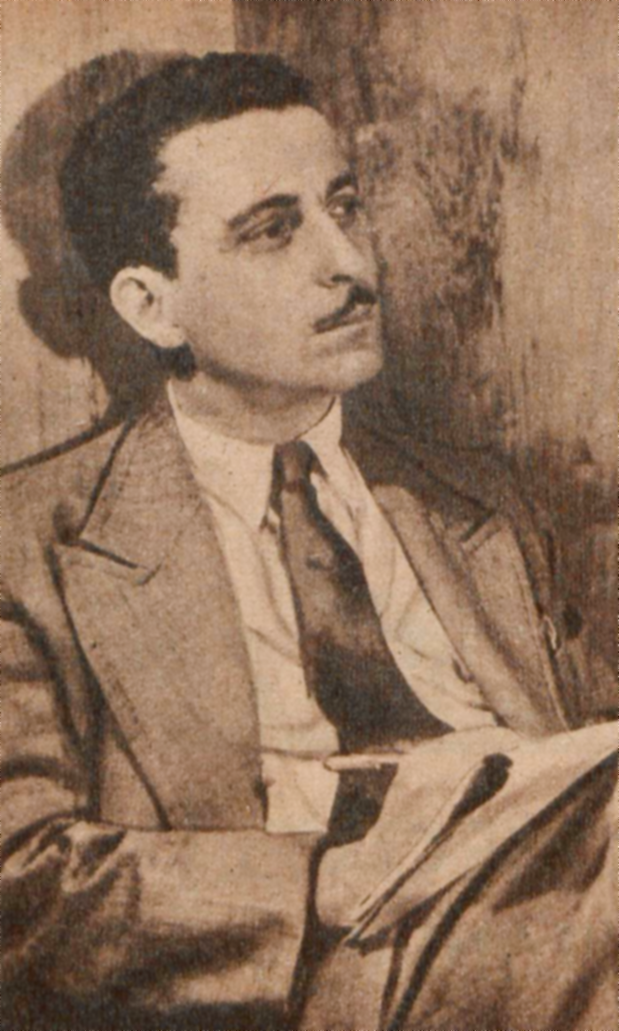 Carlos Alberto Ferreira Braga, conhecido como Braguinha e também por João de Barro, (Rio de Janeiro, 29 de março de 1907 — Rio de Janeiro, 24 de dezembro de 2006) foi um compositor brasileiro